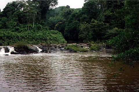 Insira_uma_descrição_para_sua_foto